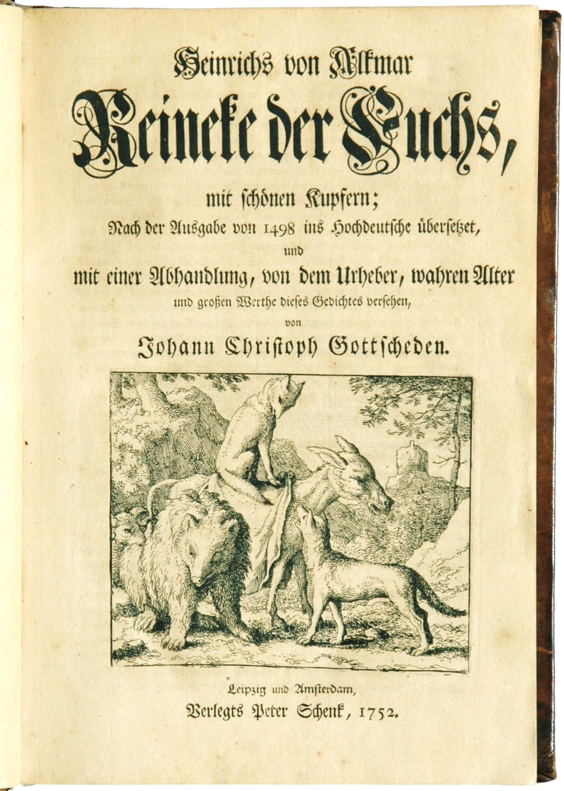 Johann Christoph Gottsched: Reineke der Fuchs Titelblatt 1752 Foto: © Foto H.-P.Haack